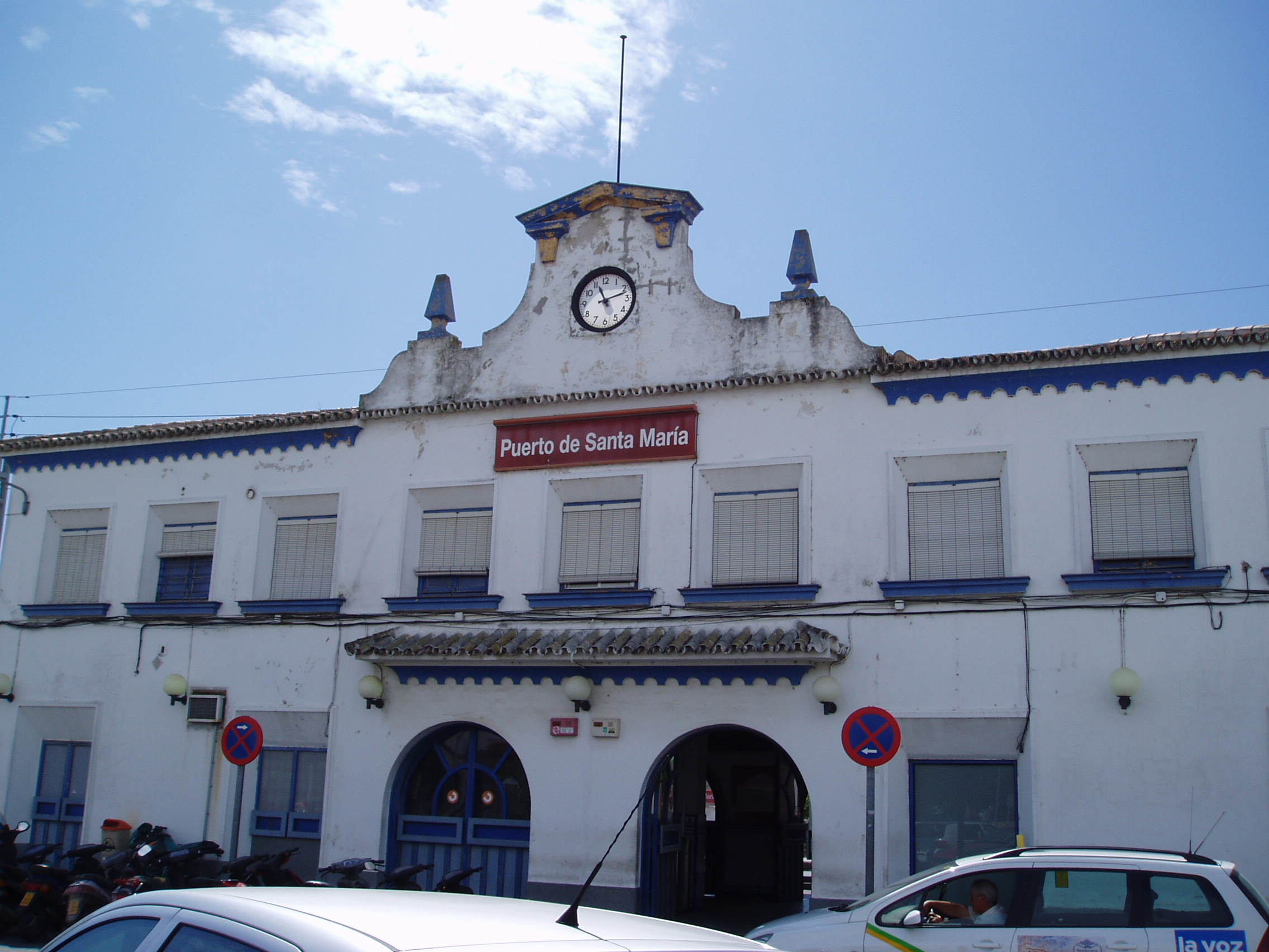 Antigua estación de trenes de El Puerto de Santa María, Andalucía, España. Este inmueble de los años 50 del siglo XX fue demolido a mediados de noviembre de 2007.